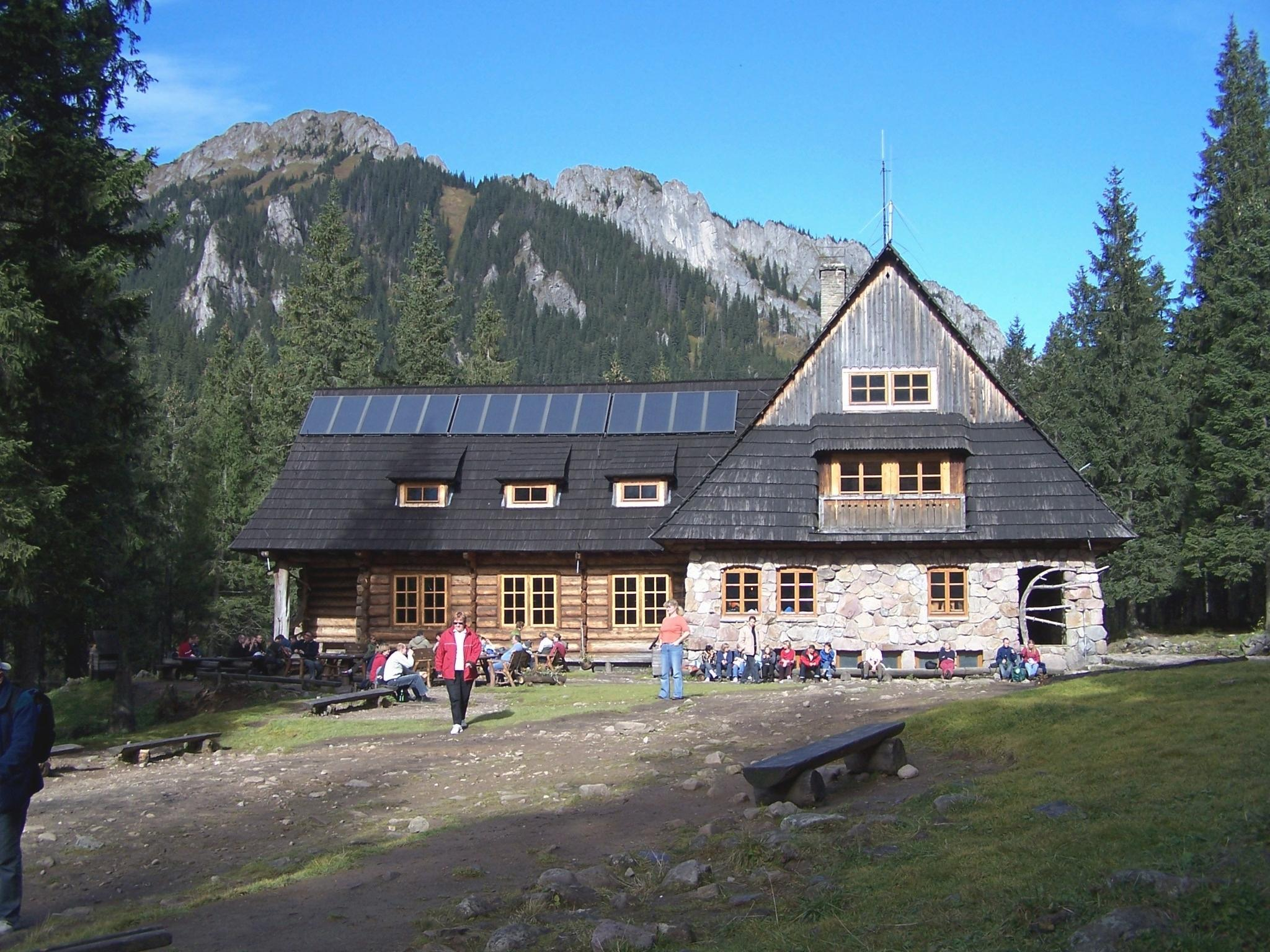 Schronisko PTTK na Hali Ornak